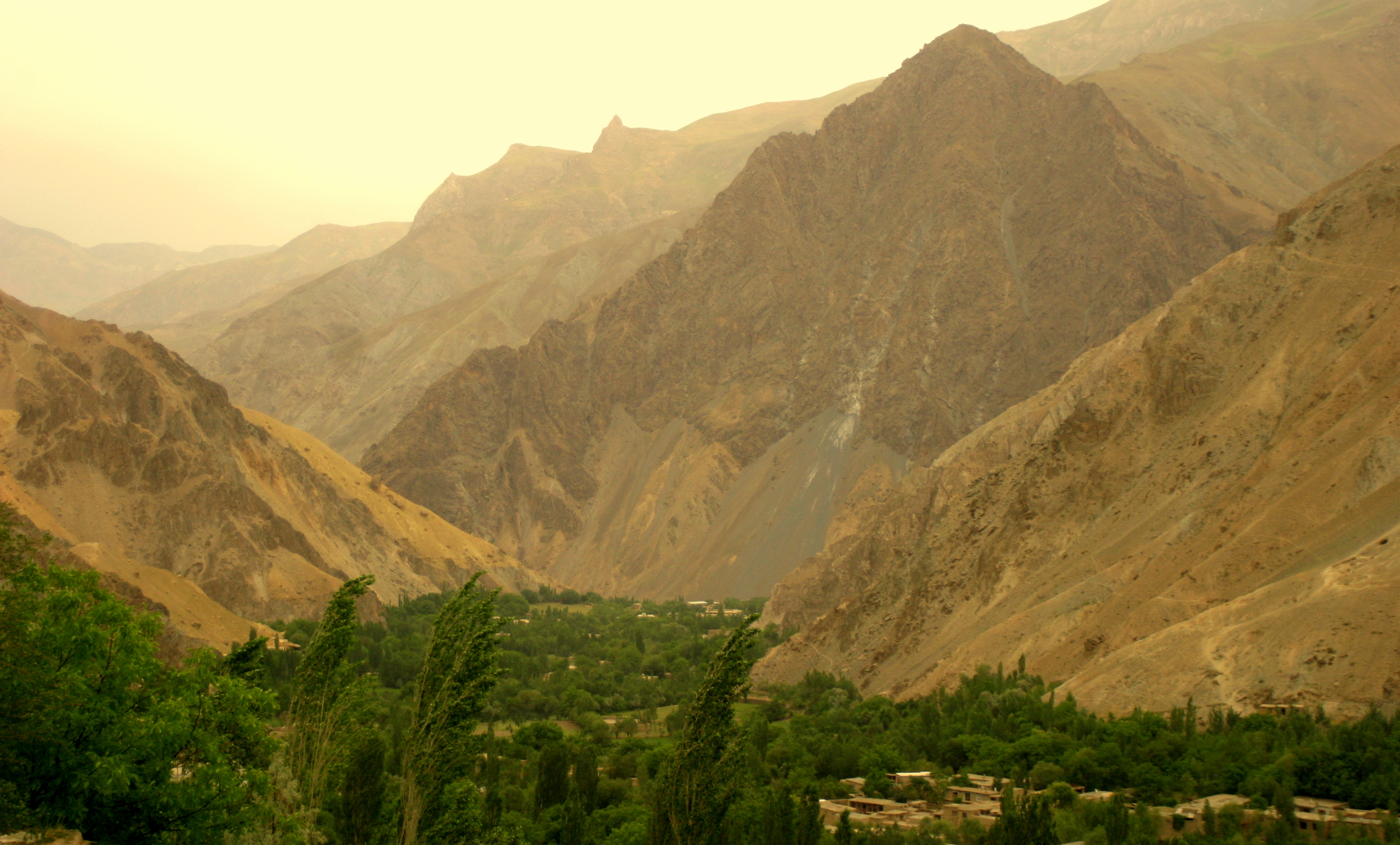 این عکس را من در جوزای 94 از قریه چنارک گرفتم.